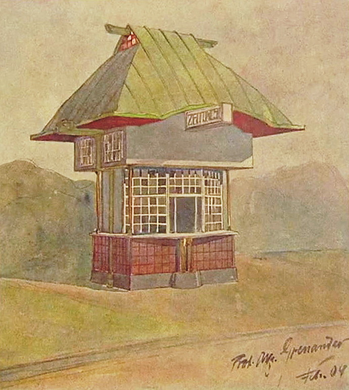 Zeitungskiosk i Berlin akvarell av Alfred Grenander